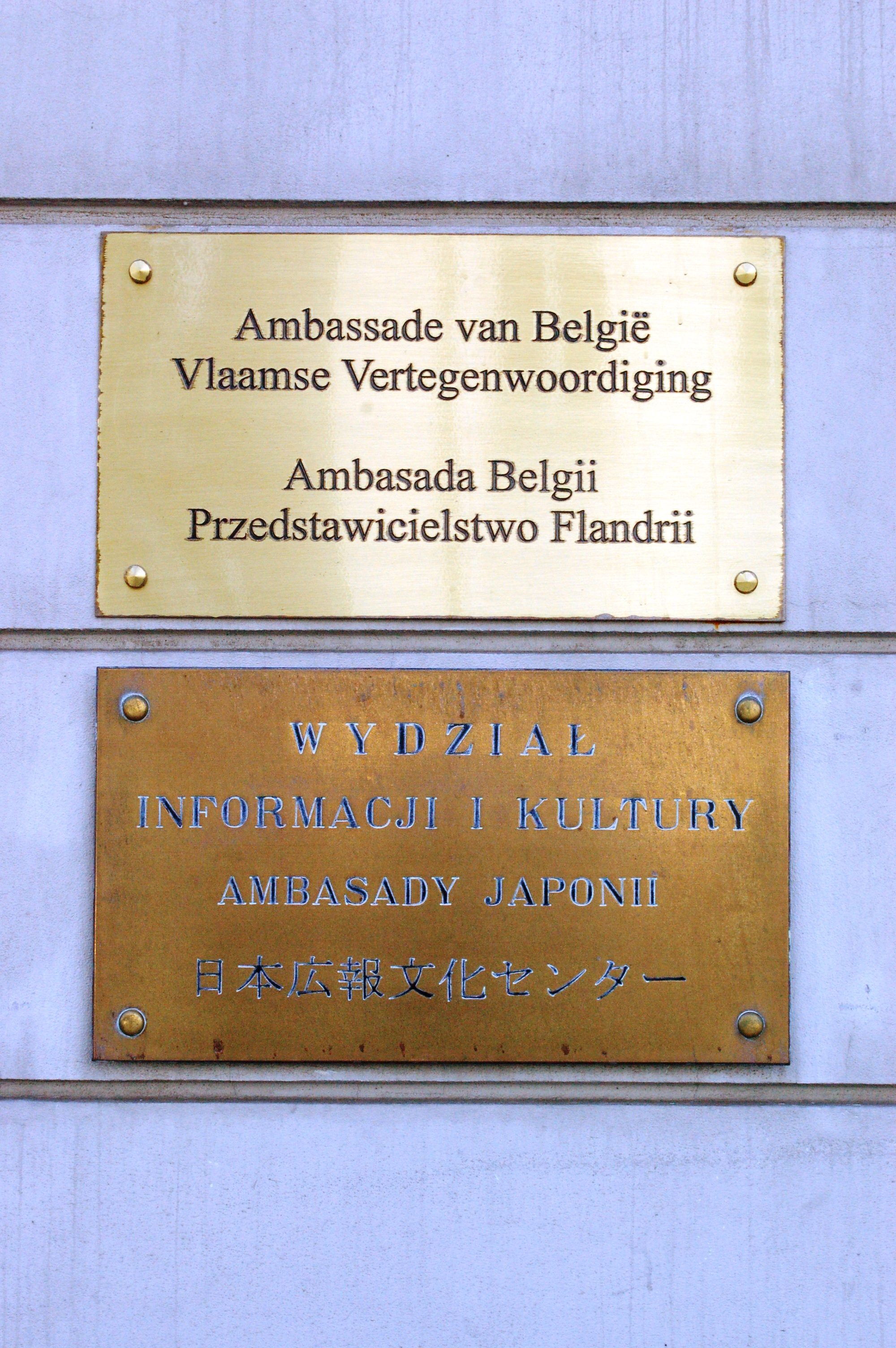 Warschau